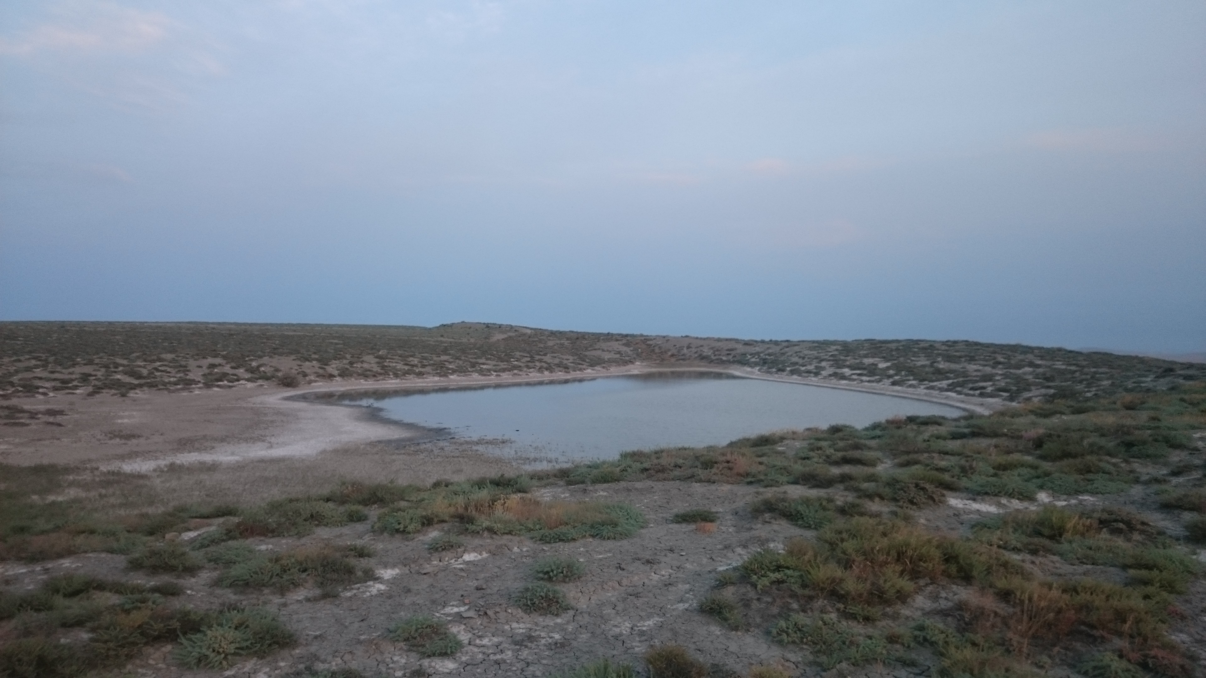 Qobuctam paçıq gölü 1